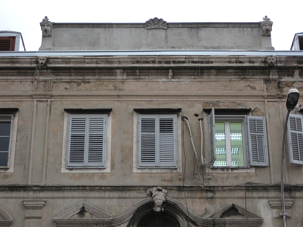 Palača Adamić u Rijeci